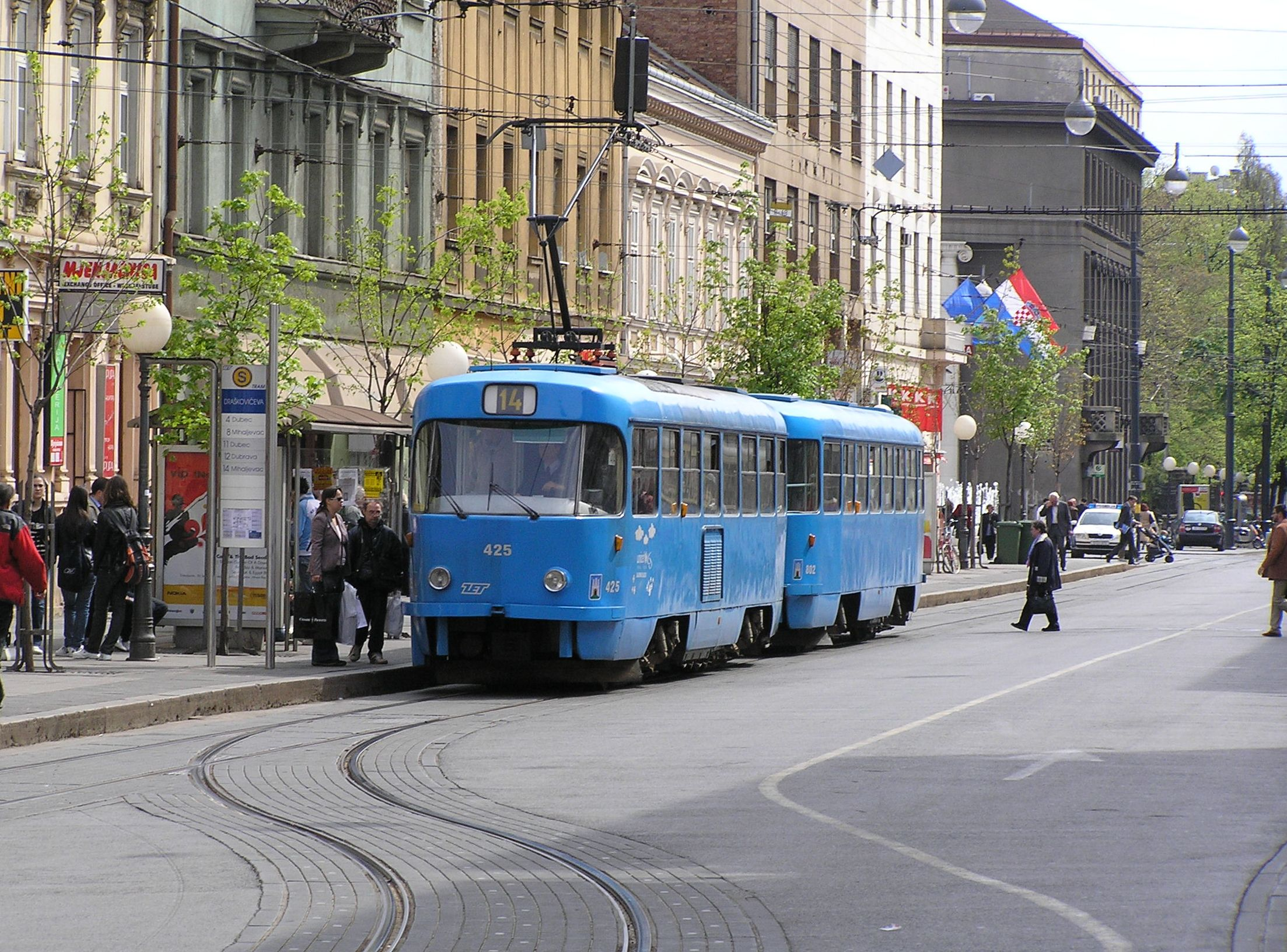 Tram in Zagreb